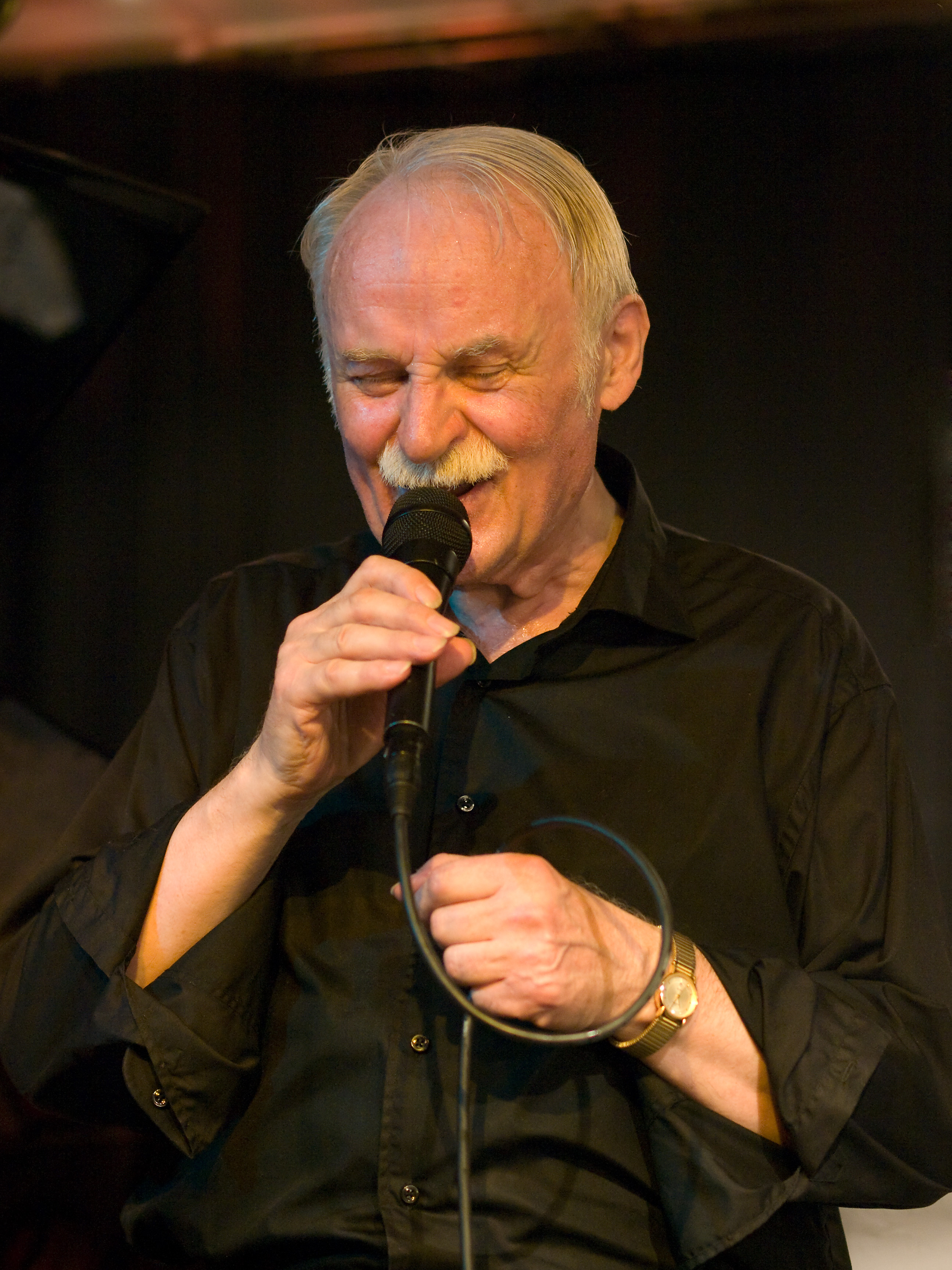 Willi Johanns, jazz singer, picture taken in Jazz club "Unterfahrt" in Munich/Germany